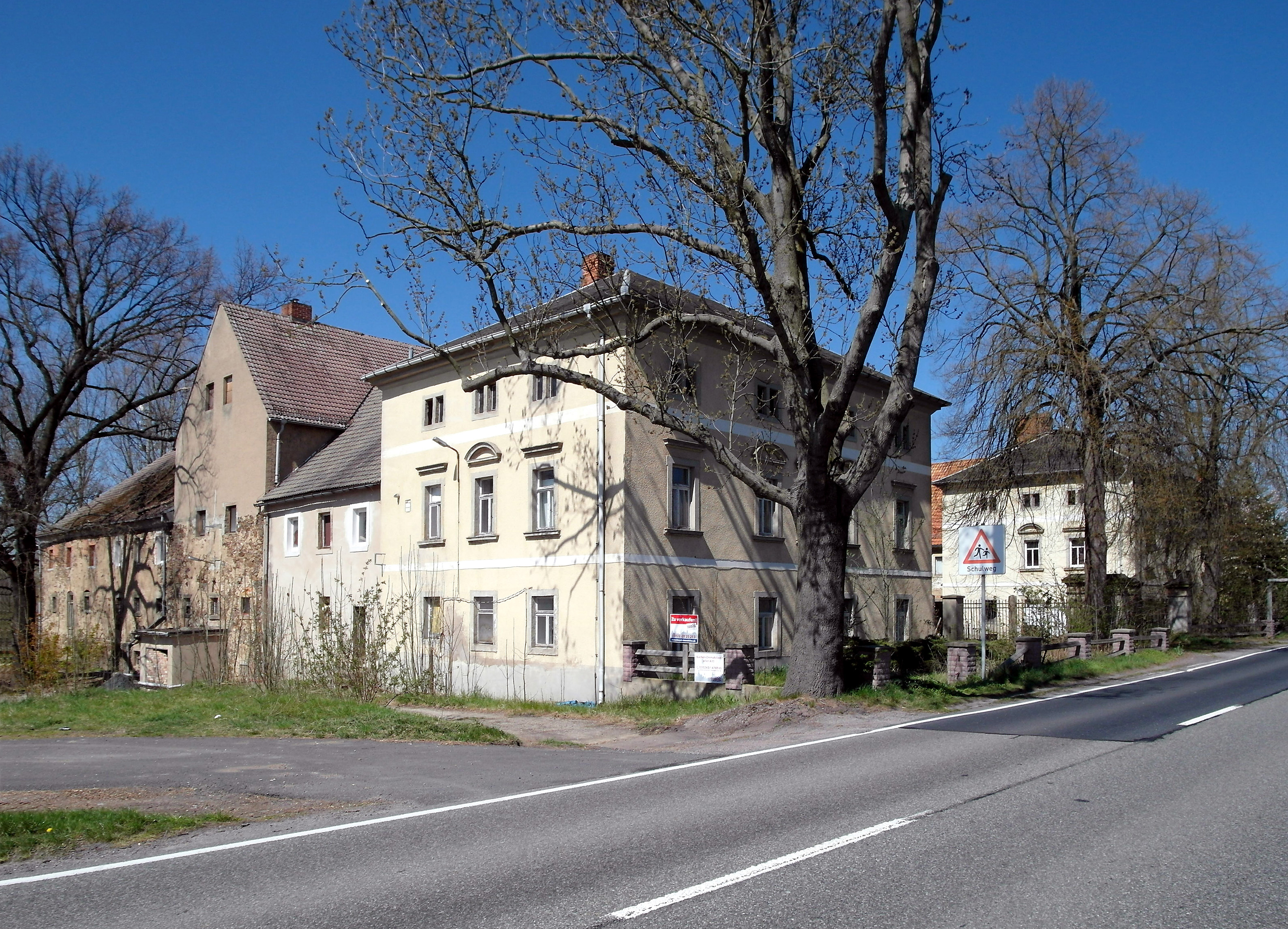 20.04.2015 01683 Katzenberg (zu Nossen): Freigut Katzenberg (1890-1895) von Süden, Katzenberg 1 (GMP: 51.093018,13.355362) [SAM9938.JPG]20150420605DR.JPG(c)Blobelt